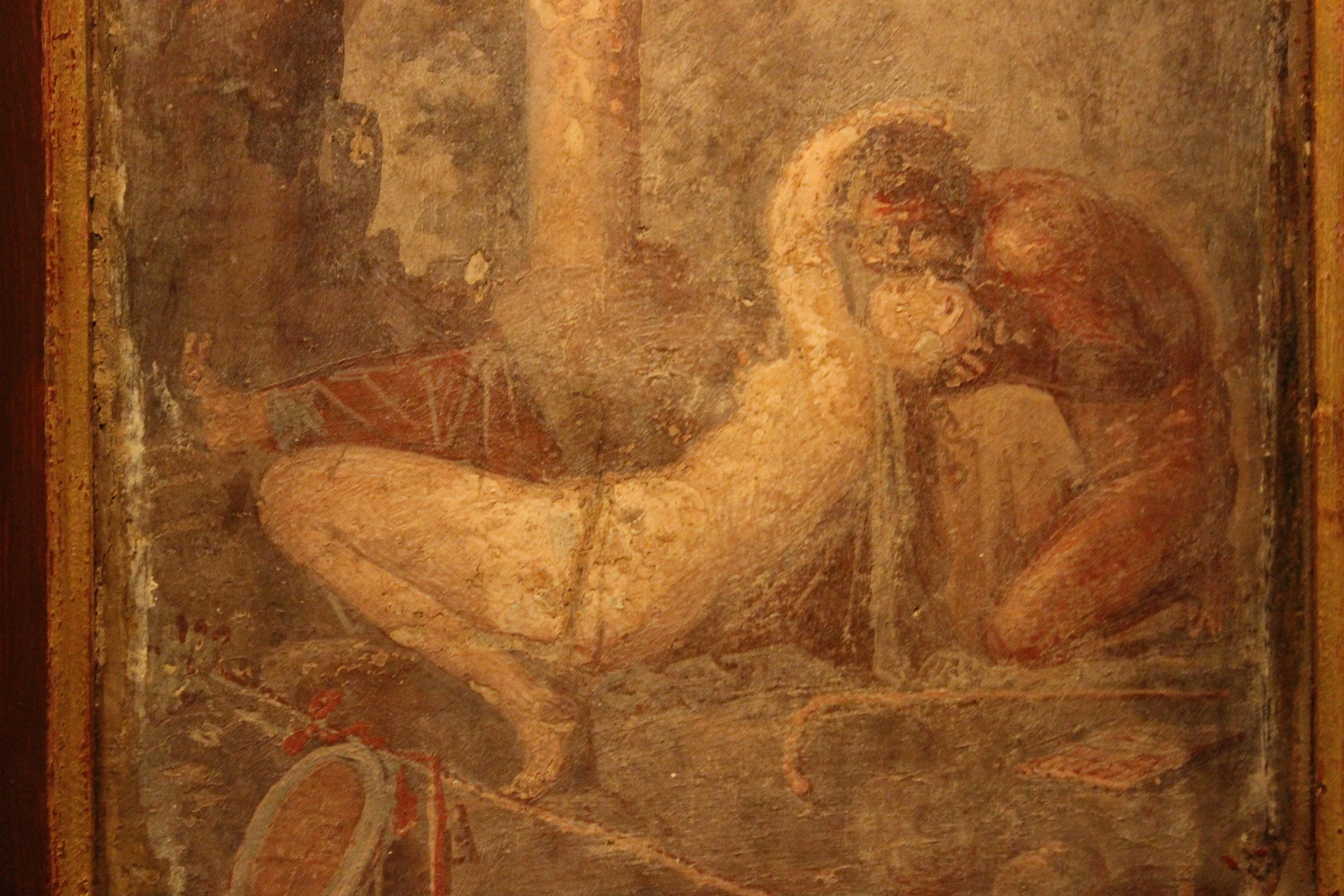 Nápoles. Museo Archeologico Nazionale. Fresco erótico.